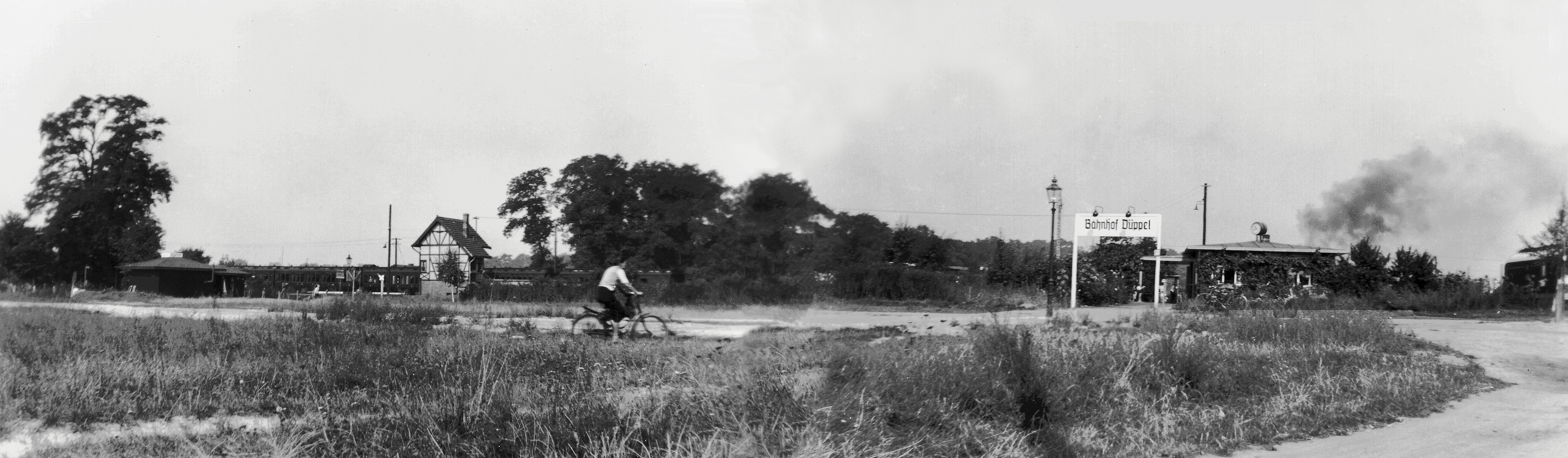 Bahnhof Düppel vom Süden. Links im Bild die Straßenquerung Benschallee, rechts der Haltepunkt Düppel. Im Vordergrund ein Fahrzeug-Wendeplatz auf Kleinmachnower Seite. Hinweis: Das Panorama wurde aus zwei Teilbildern zusammengefügt. Durch die örtlich und zeitlich versetzten Aufnahmen gibt es Ungenauigkeiten; zum Beispiel ist der einfahrende Zug (Rauch) doppelt vorhanden.